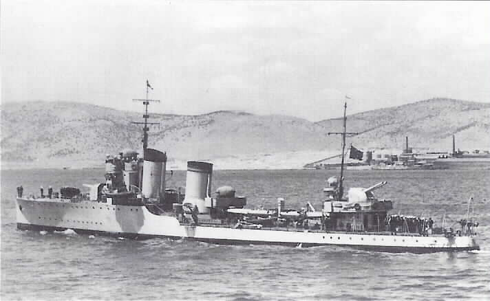 Der italienische Zerstörer Francesco Crispi der Sella-Klasse